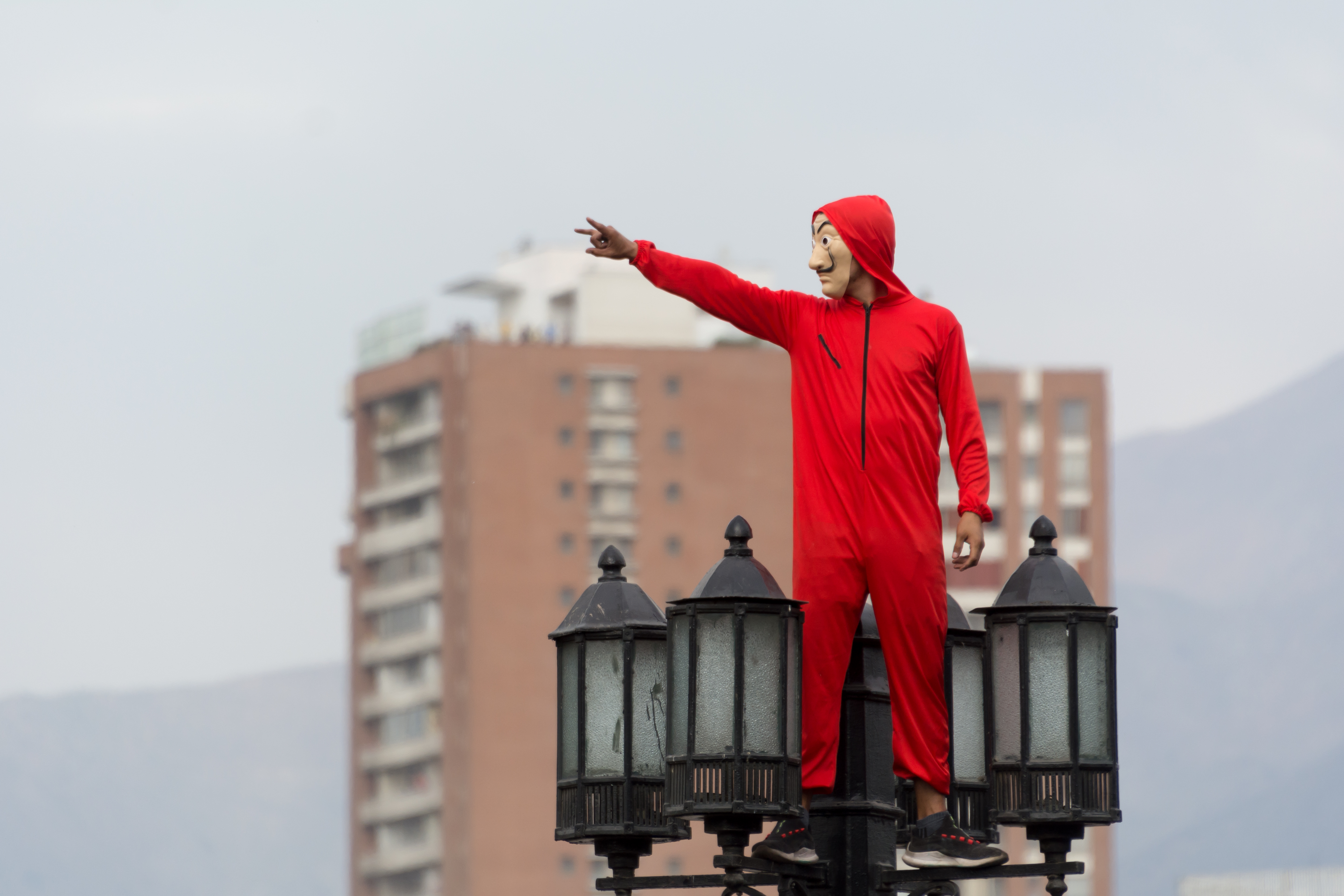 Protestas en Chile de 2019, Santiago, Chile.